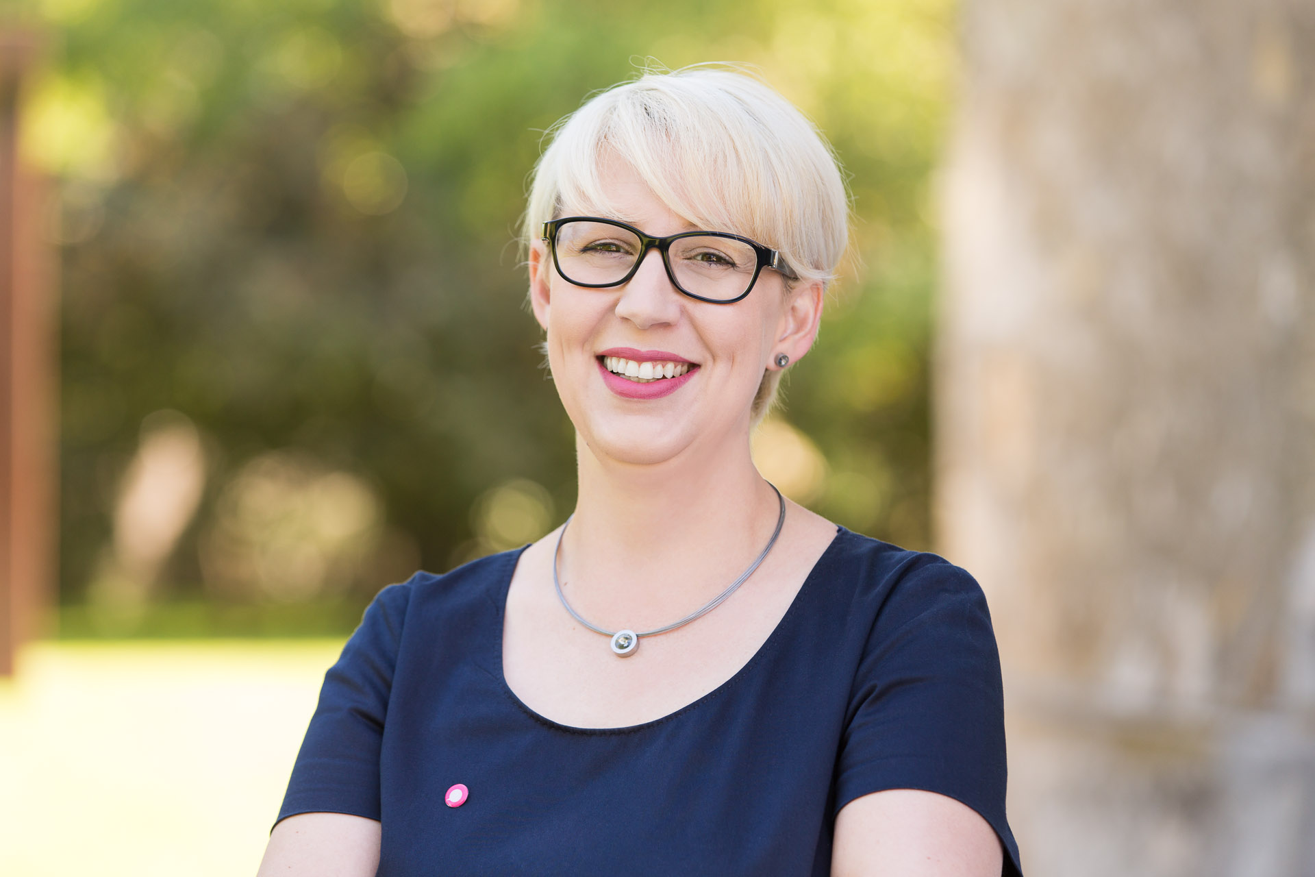 Vorarlberger NEOS-Landtagsabgeordnete Sabine Scheffknecht